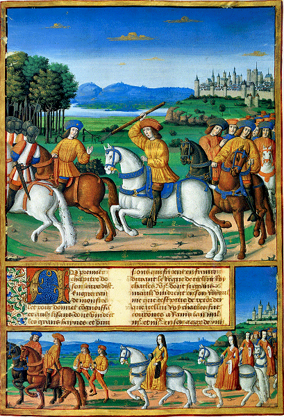 König Karl VI. von Frankreich auf der Jagd. Königin Isabella (Isabeau de Bavière) folgt ihm in seinem Gefolge. Miniatur aus der Chronik des Enguerrand de Monstrelet